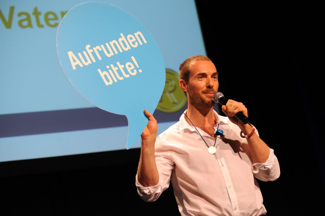 Christian Vater, Gründer von Deutschland rundet auf